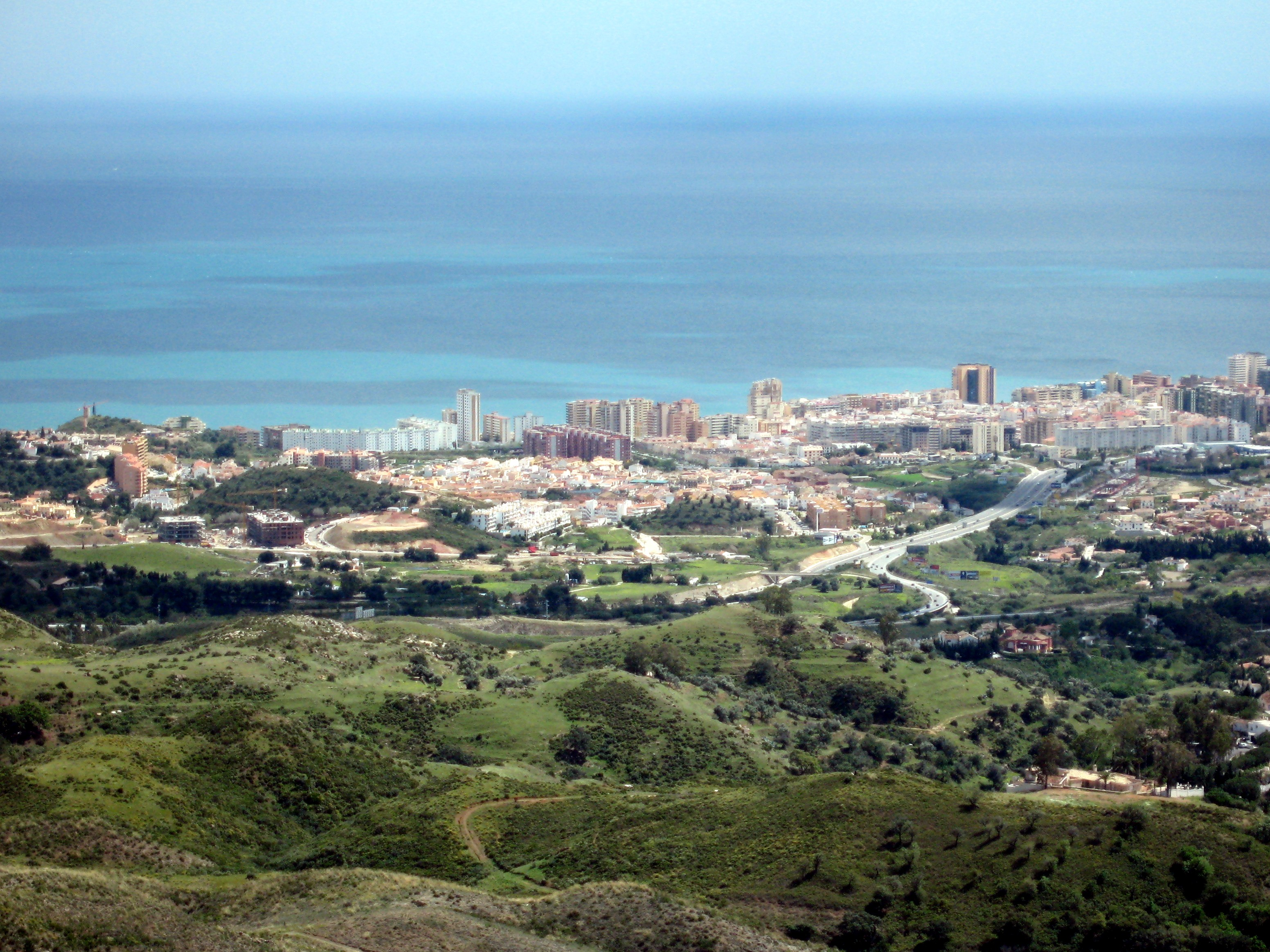 Blick von Mijas auf Fuengirola (Los Boliches), Provinz Málaga, Andalusien, Spanien